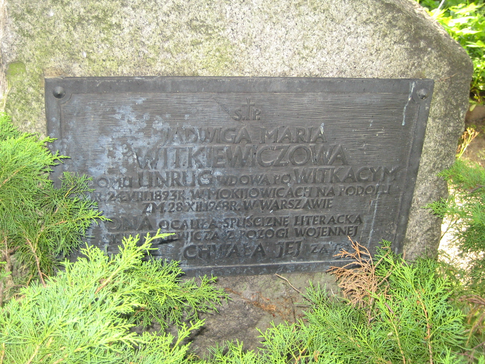 Grób Jadwigi Witkiewiczowej